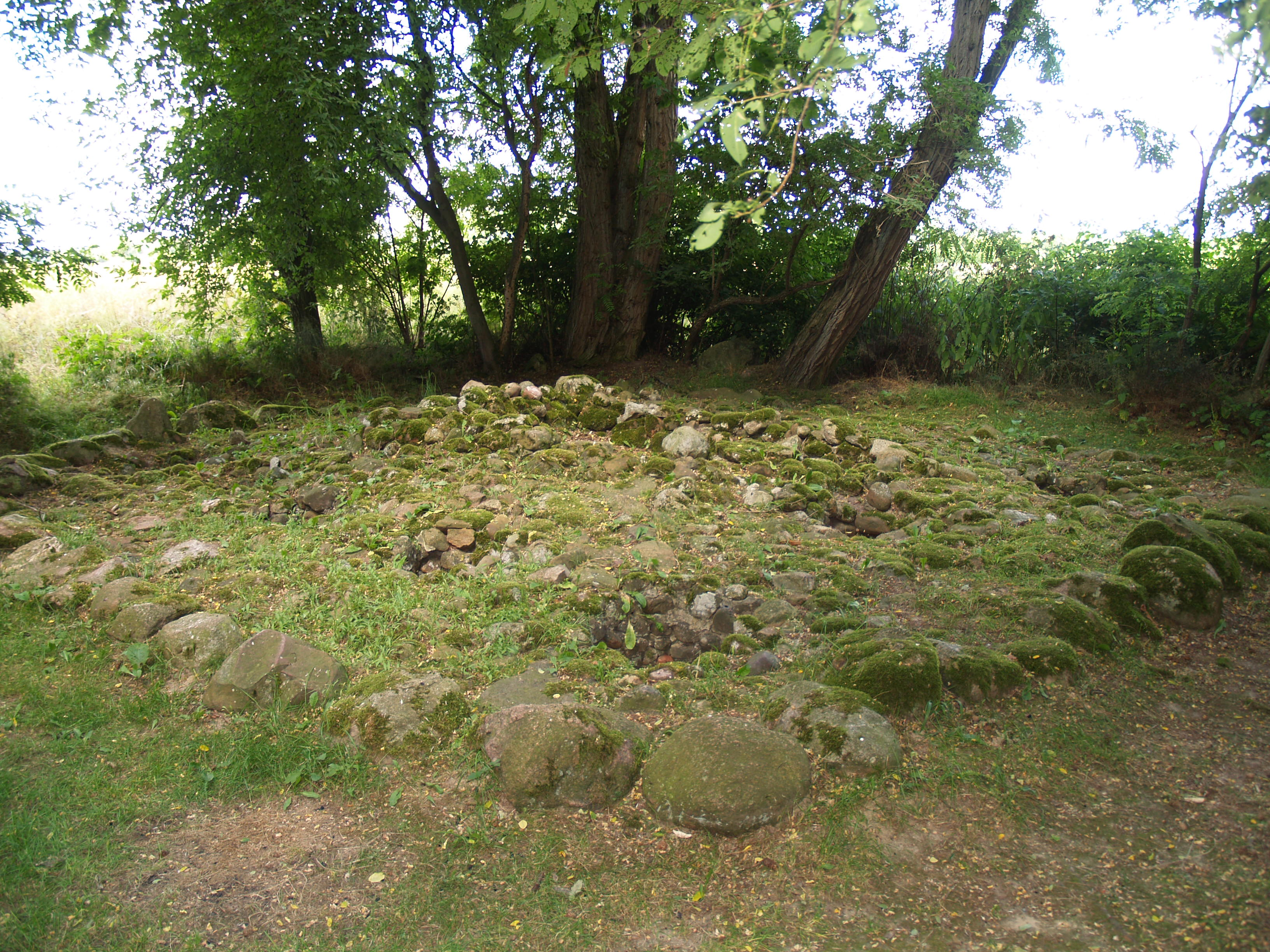 Totenhaus von Tesperhude, Schleswig-Holstein, Deutschland